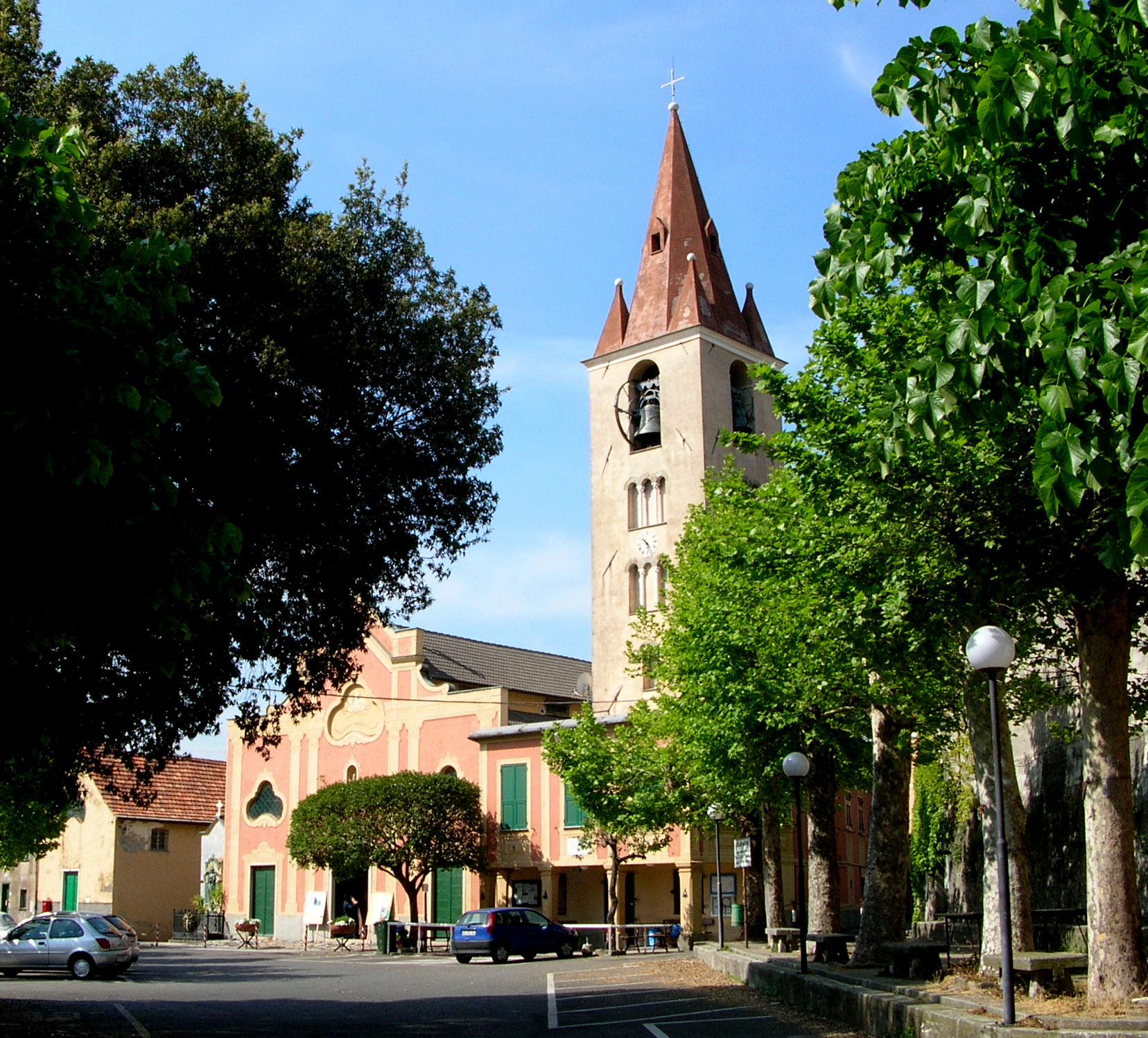 La chiesa dei santi Cornelio e Cipriano (Serra Riccò, Genova) Foto propria Novembre 2009